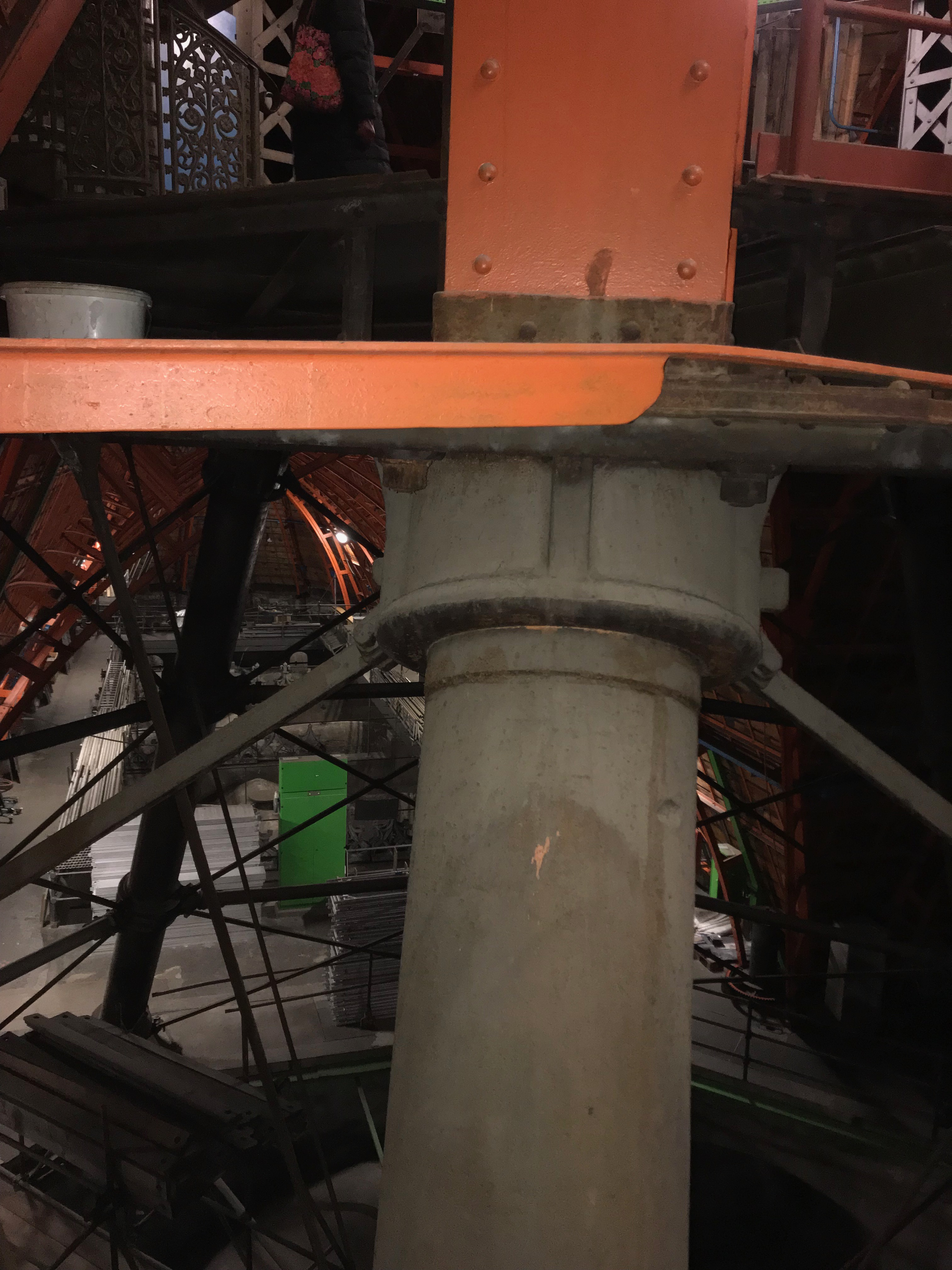 Basis des Vierungsturm des Kölner Domes